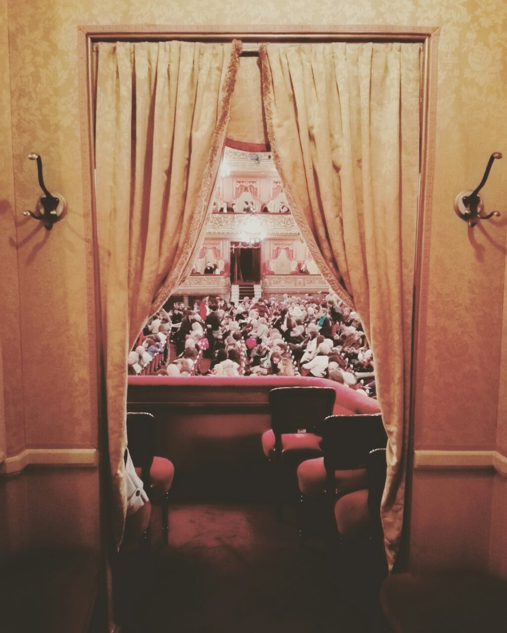 Vista desde uno de los palcos laterales hacia la sala central